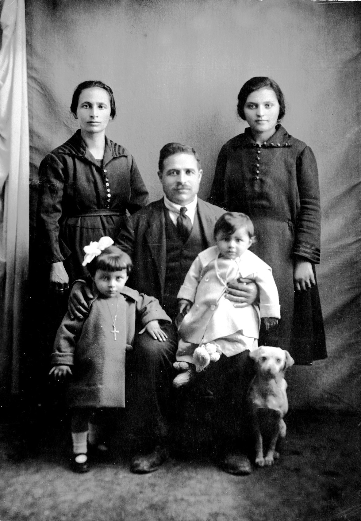 Photo de la famille Gaïtis